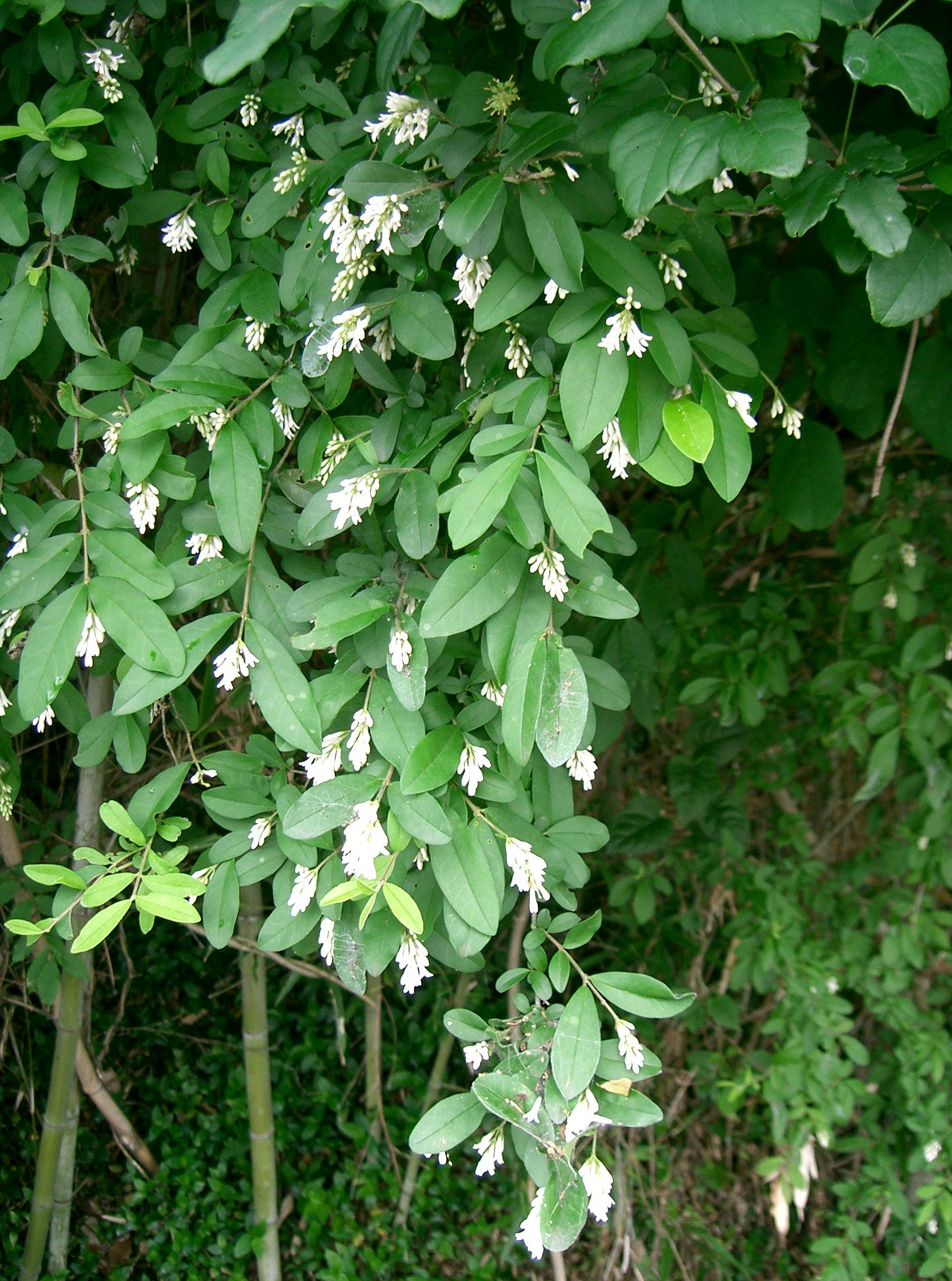 Ligustrum obtusifolium